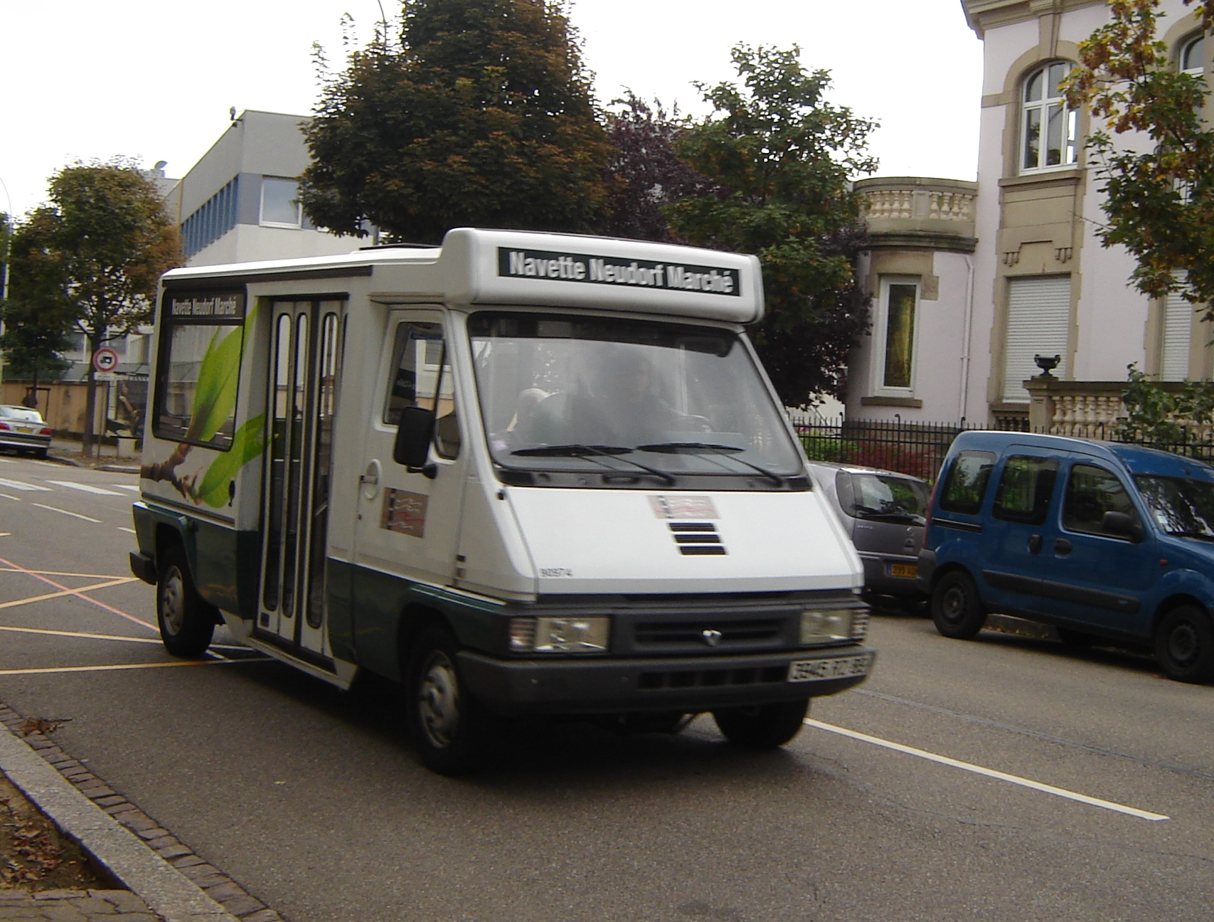 Renault Master sur la Navette Neudorf Marché, Transdev Alsace, Strasbourg